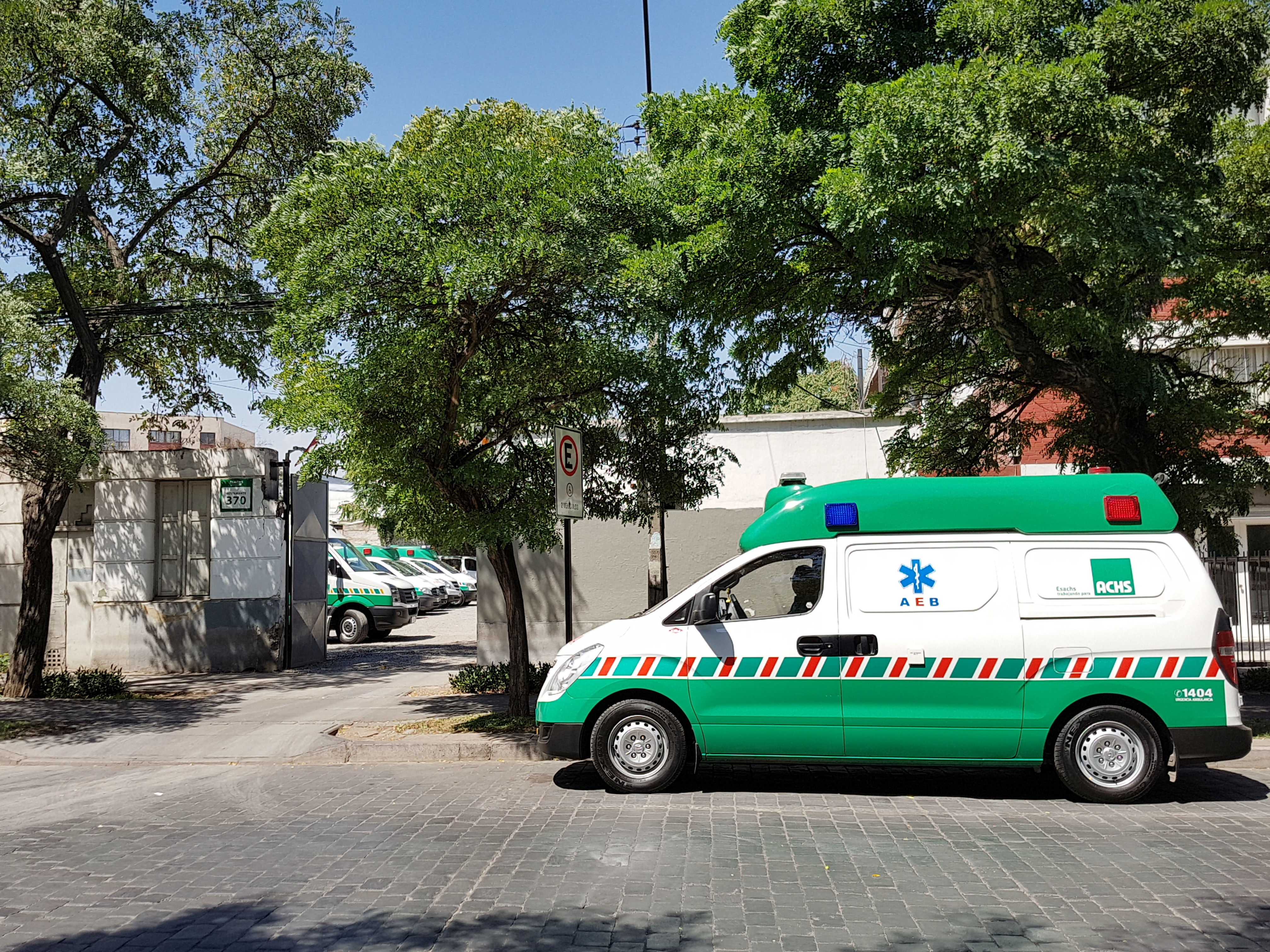 La ESACHS (Empresa de Servicios para la Asociación Chilena de Seguridad), en la avenida Bustamante 370, acera poniente entre entre Santa Isabel y Marín; comuna de Providencia, Santiago de Chile.